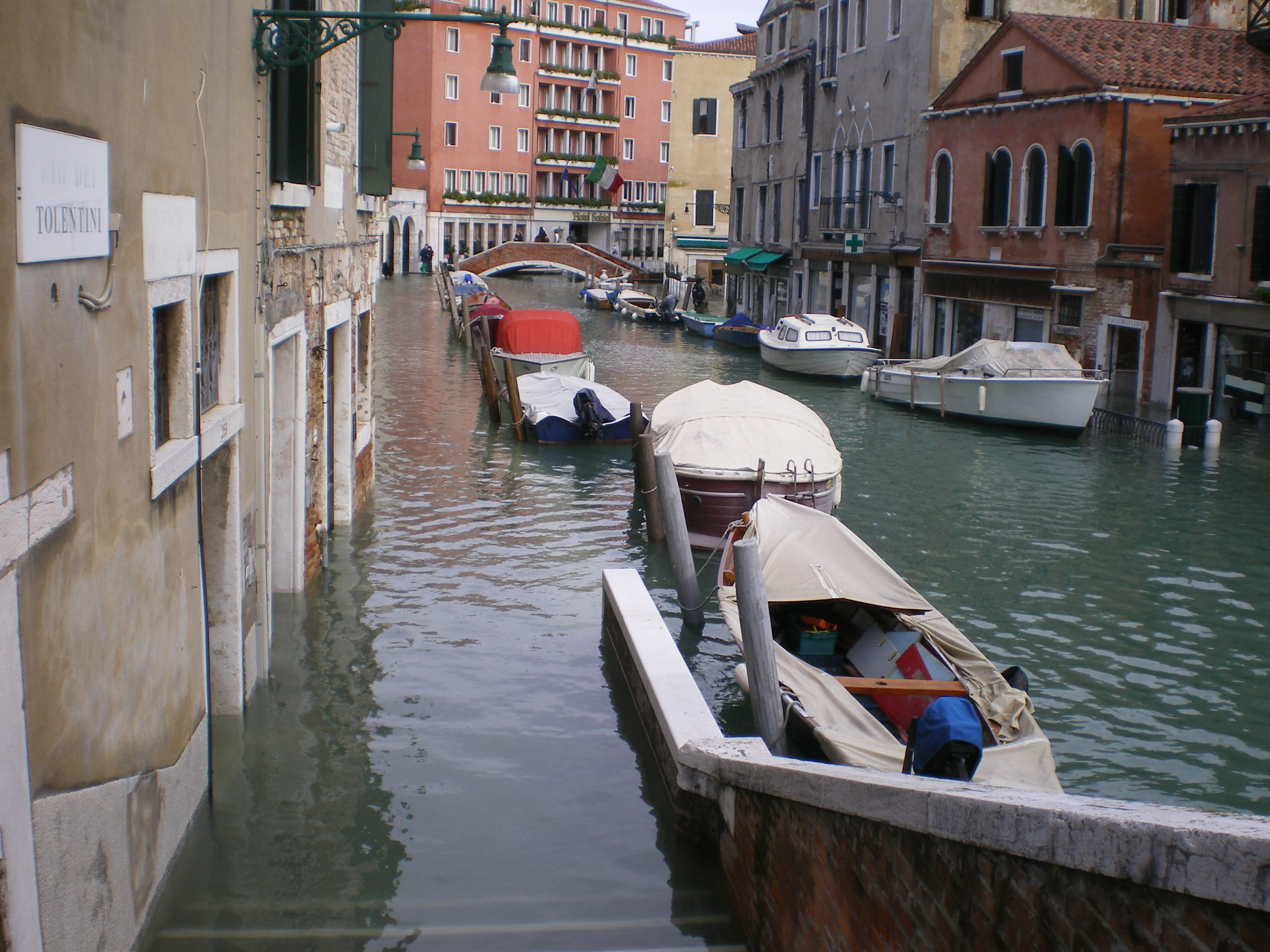 Acqua alta eccezionale a Venezia del 1/12/2008 (+156 cm). Foto scattata nei pressi del Rio dei Tolentini.